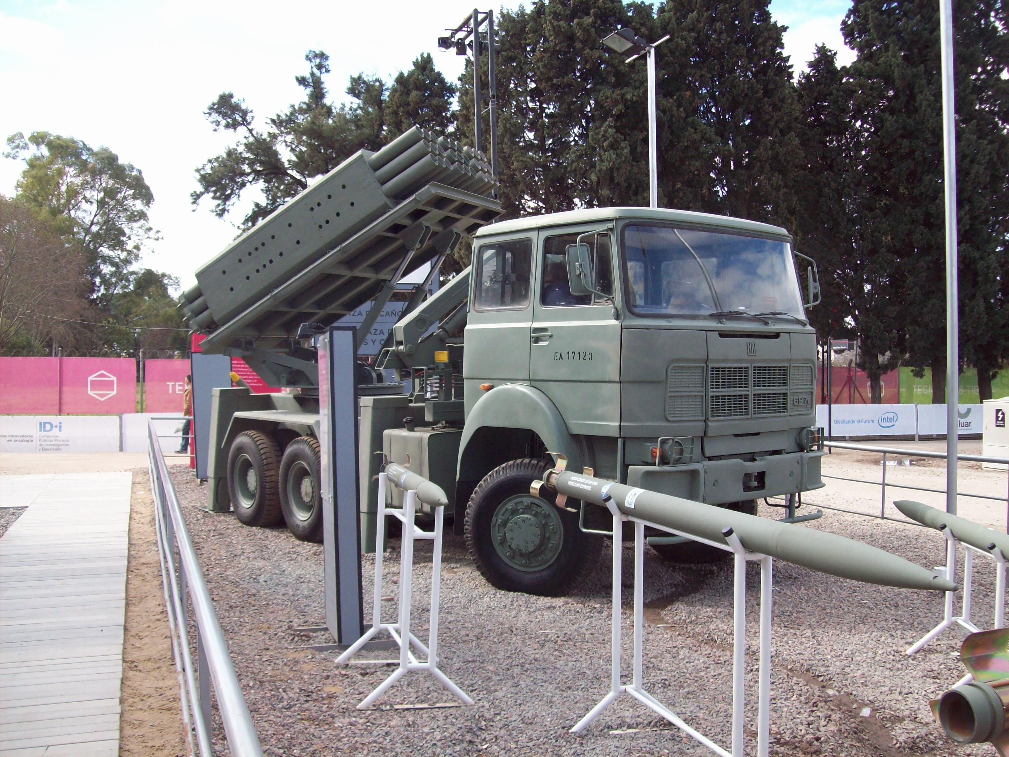 Vehículo lanzamisiles en Tecnópolis.